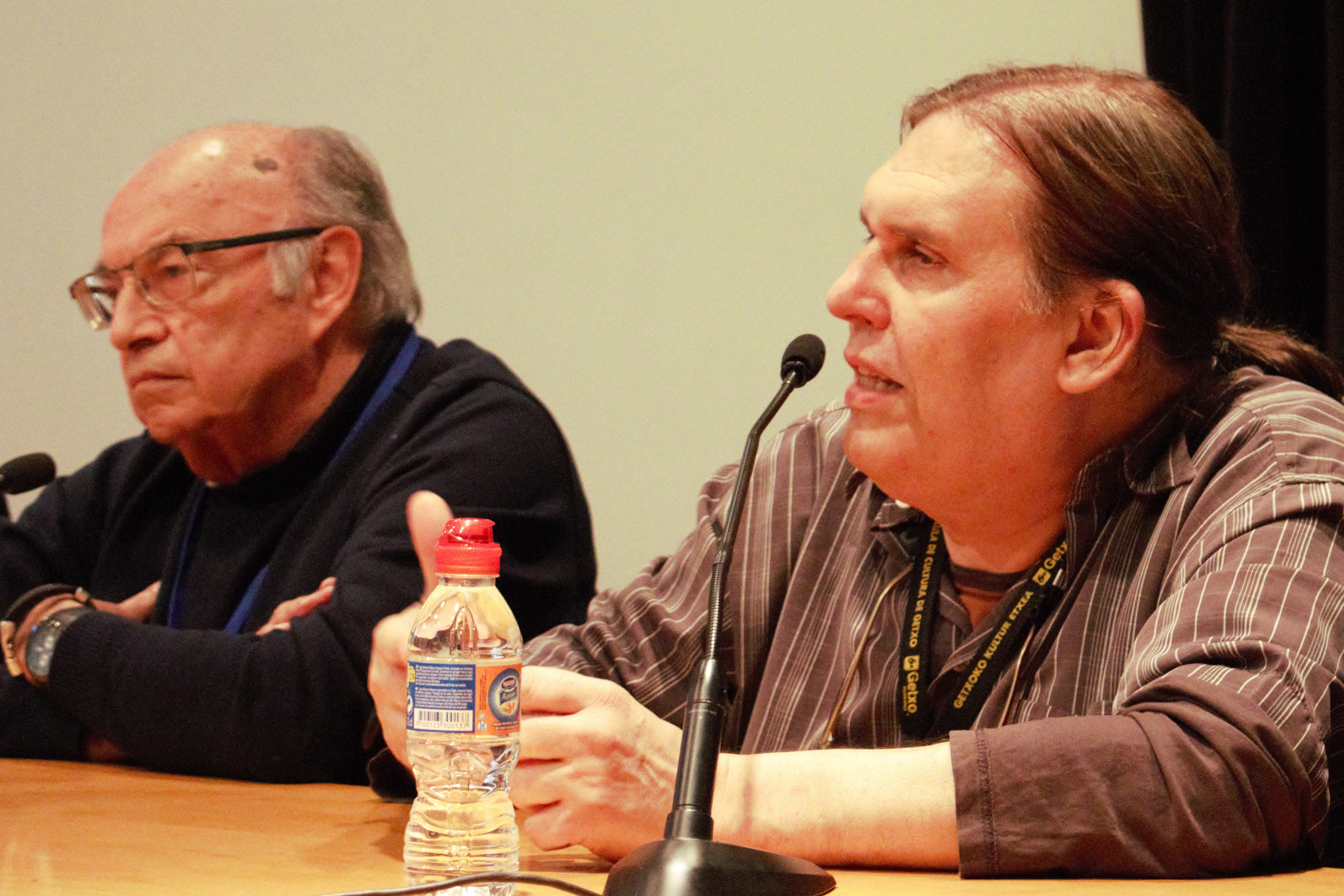 Horacio Altuna i Emilio Bernárdez a la taula rodona "Les revistes del boom". Saló Internacional del Còmic de Barcelona de 2018. Horari: 19.00-20.00 h. Data: Dijous 12 d'abril de 2018.